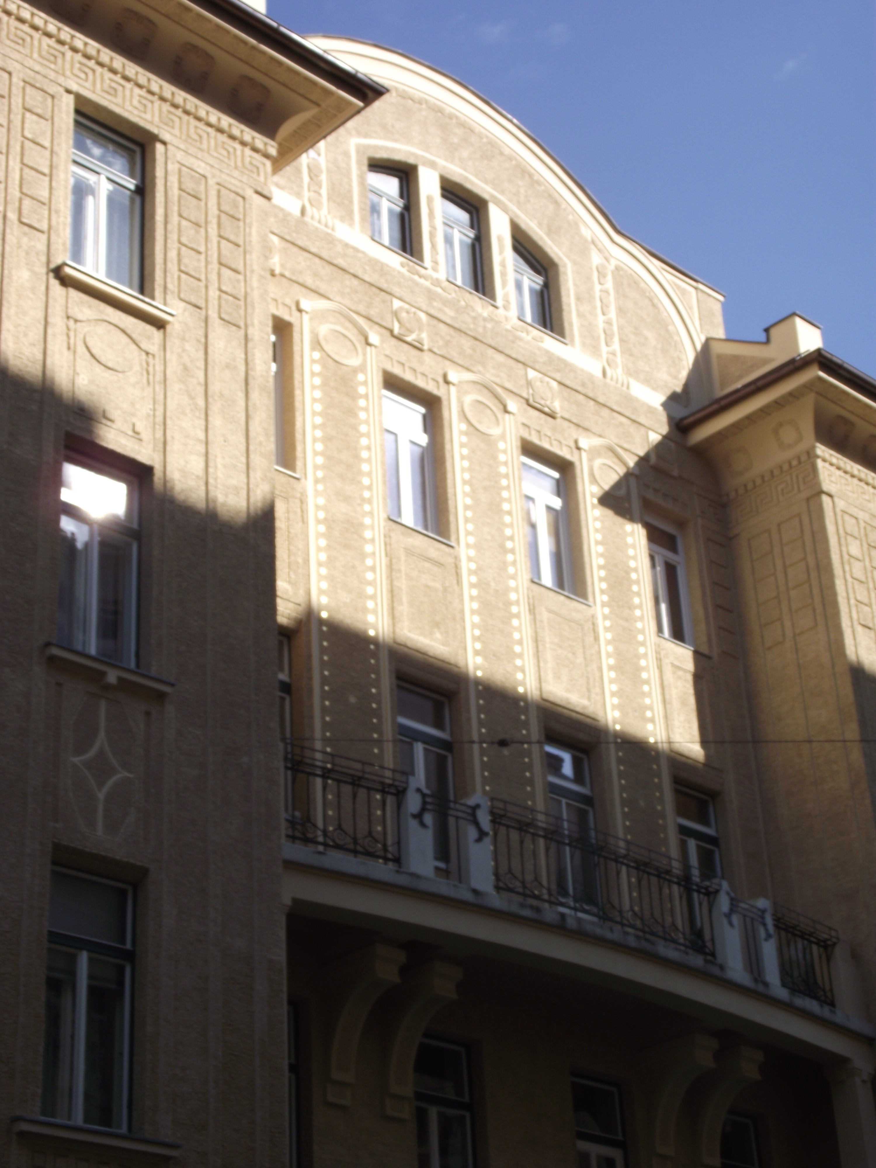 Ljubljana - Town Centre